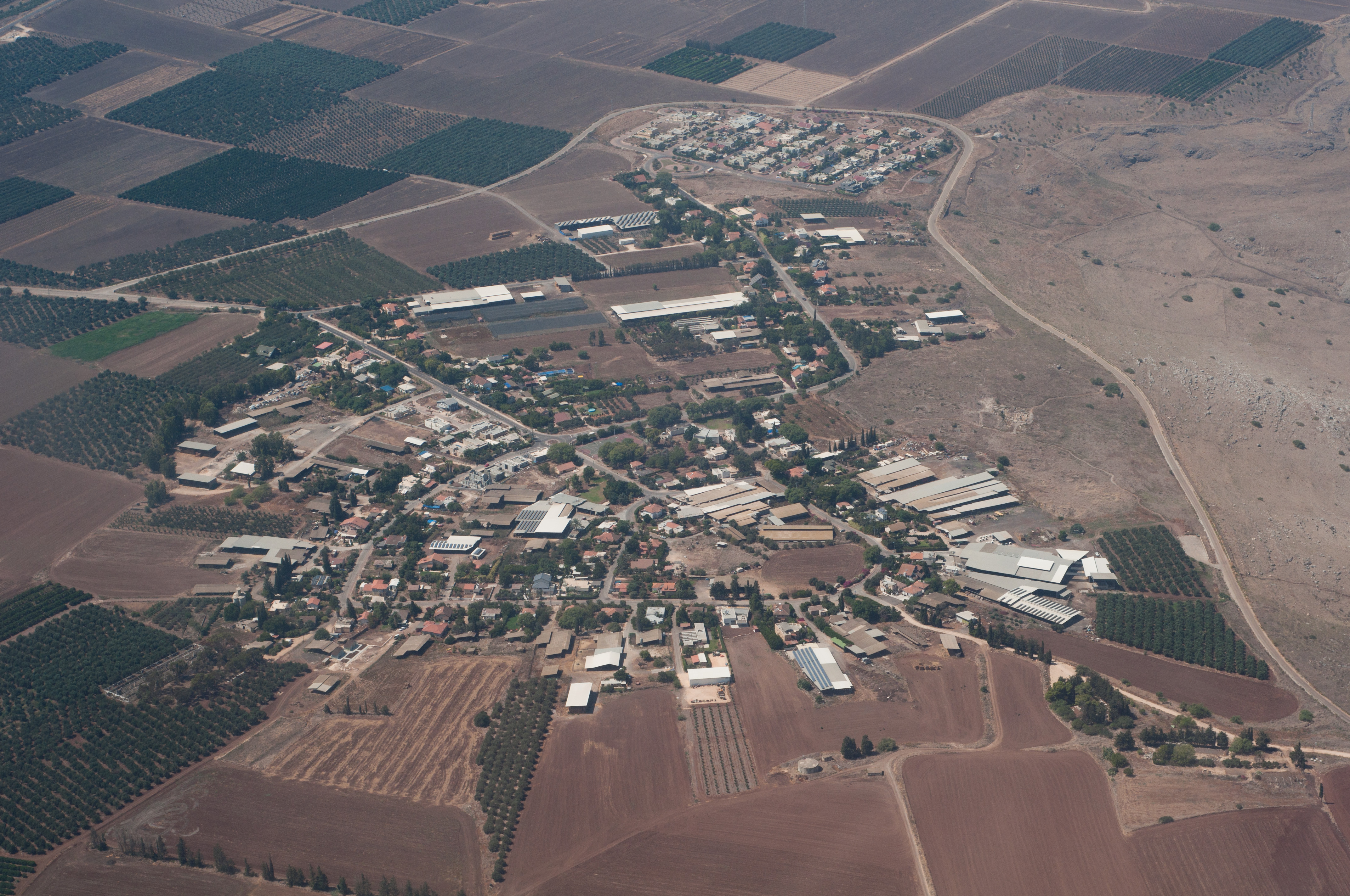 מושב ארבל